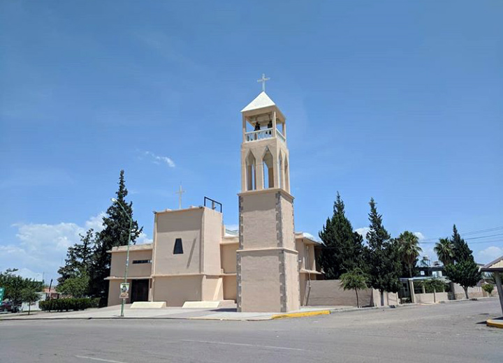 Parroquia de La Inmaculada Concepción de María en Lázaro Cárdenas, municipio de Meoqui, Chihuahua.